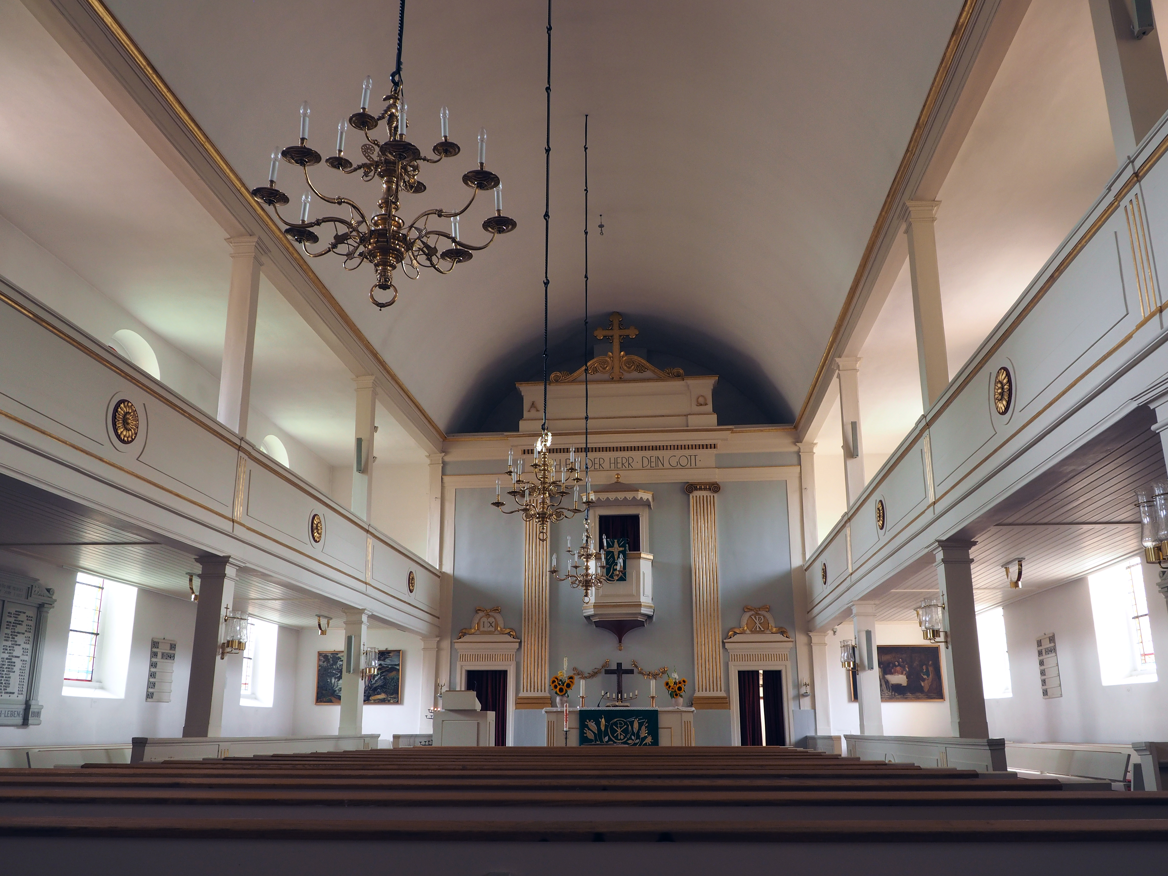 Mittelschiff der Dreikönigskirche Bad Bevensen